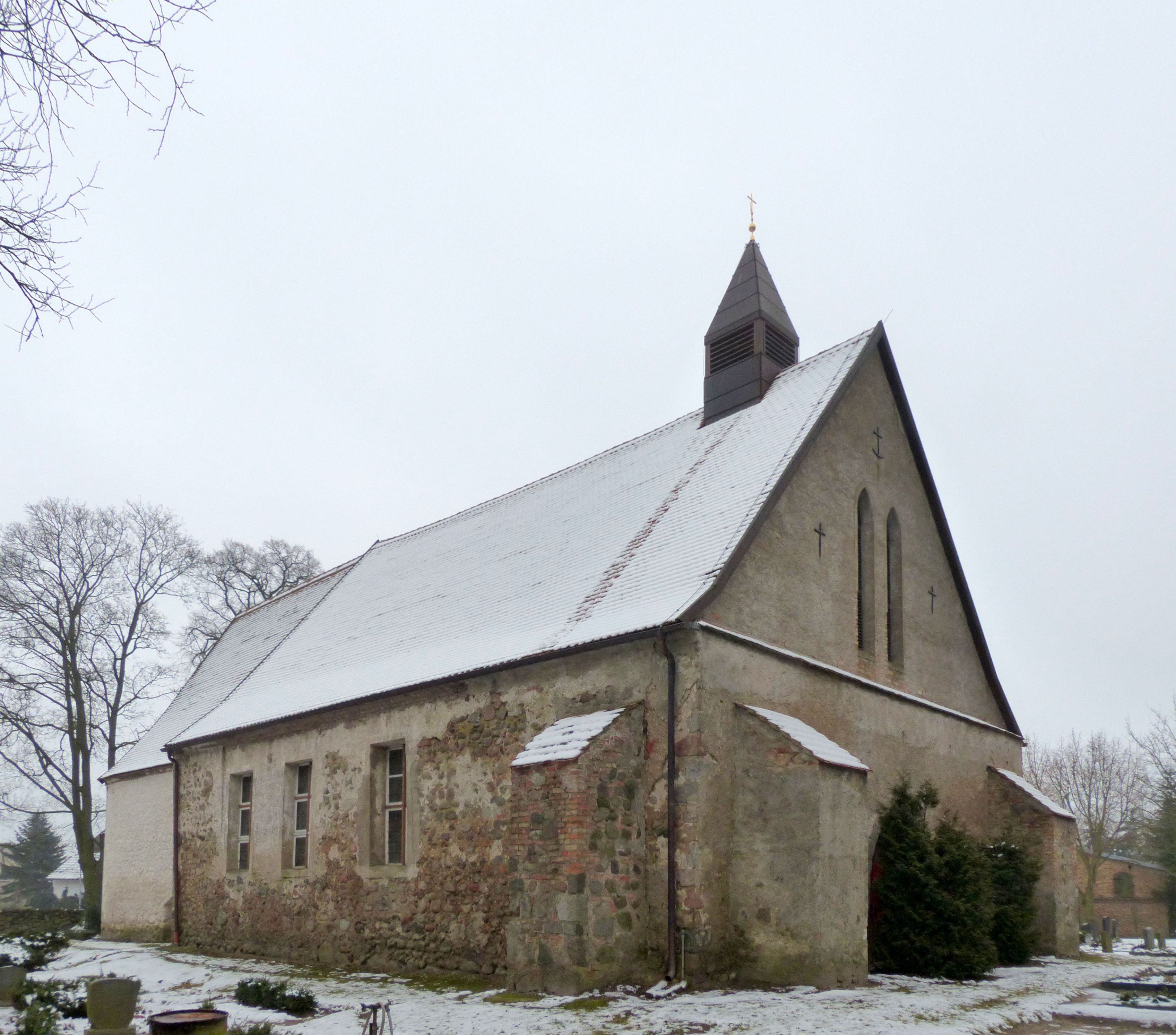 Kirche in Rathebur, Ansicht von Nordwesten